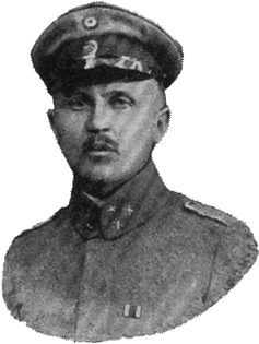 Kaarle Kalervo Kari